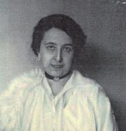 La actriz española Josefina Blanco